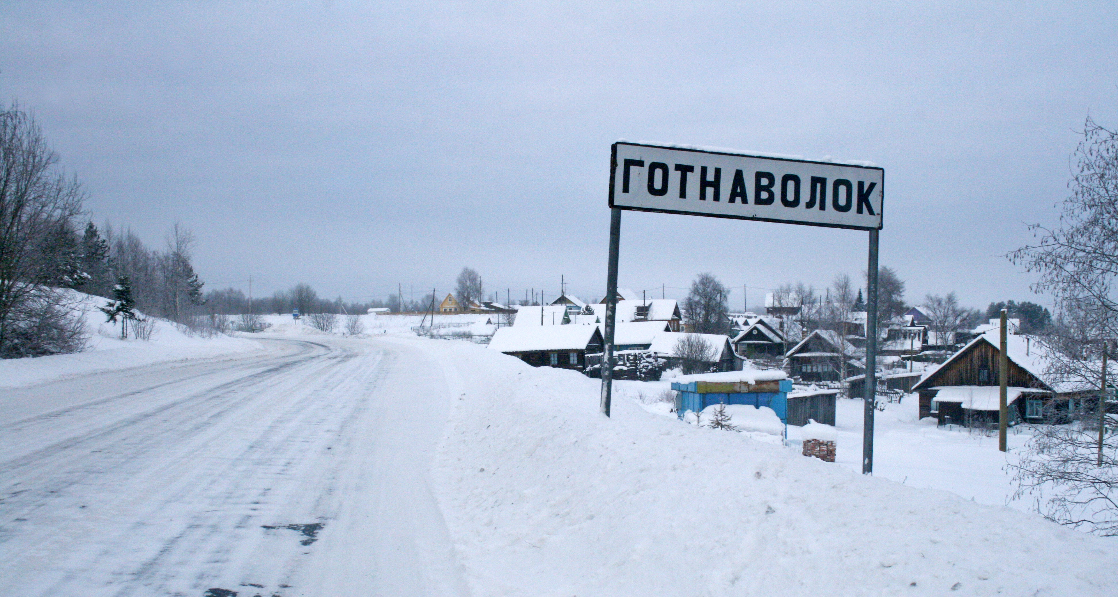 Въезд в деревню Готнаволок с южной стороны.